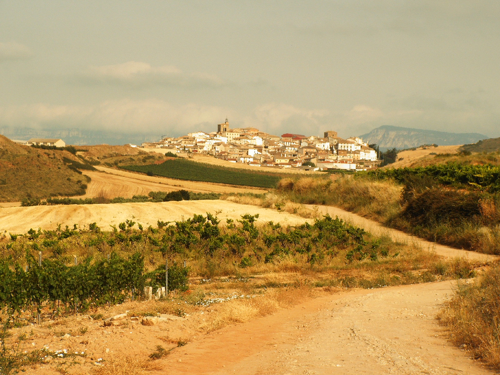 Cirauqui, Navarra